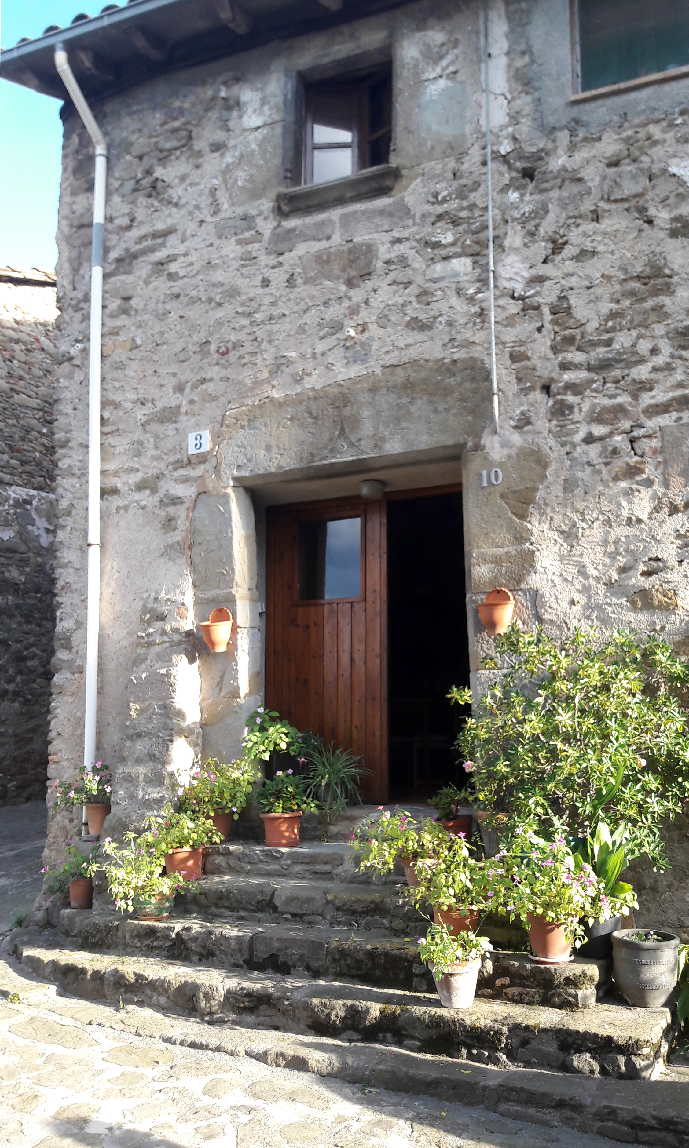 Llindes de la casa al barri de Romeria, 3 (Mieres)